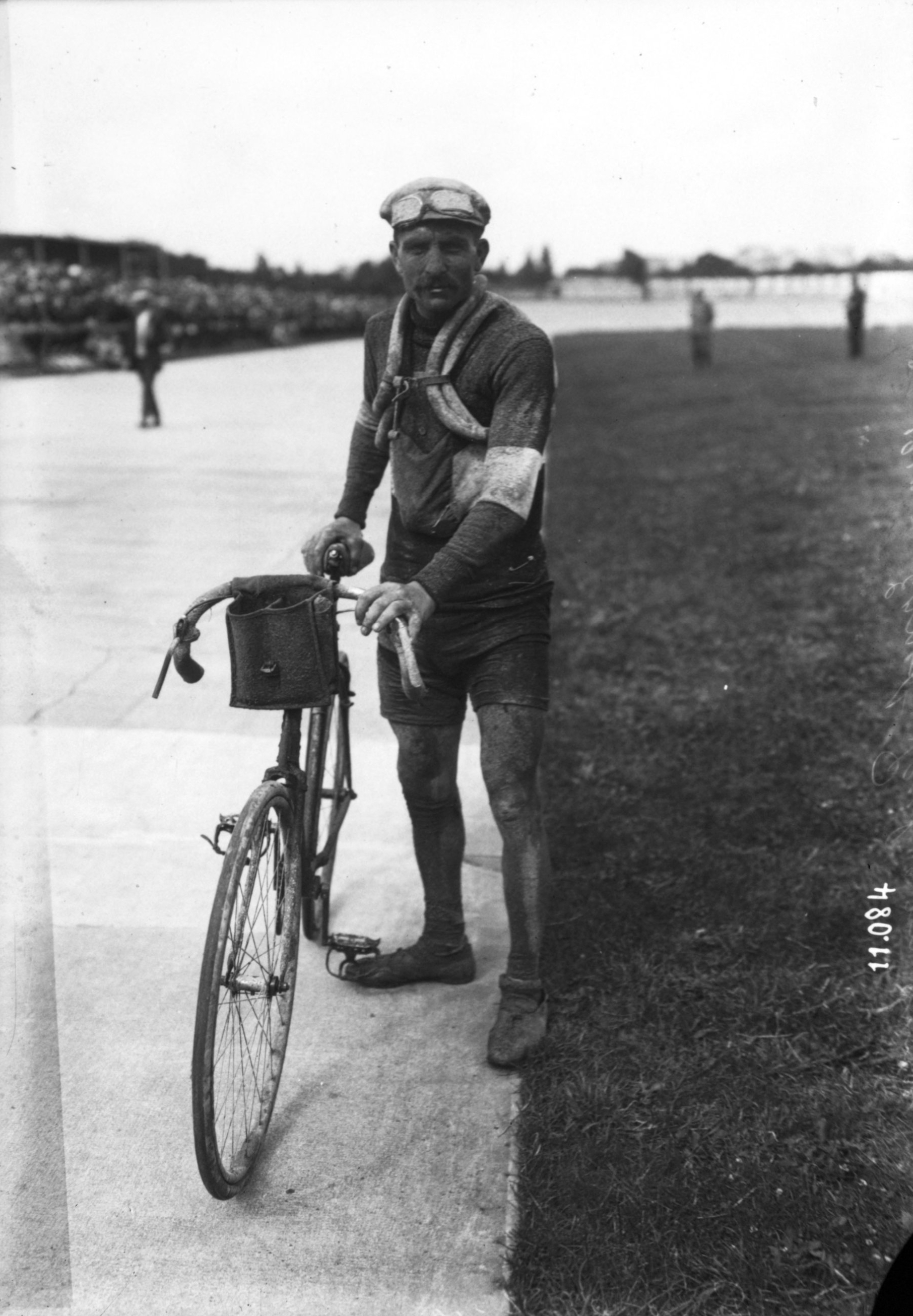 Ernest Paul à l'arrivée du Tour de France 1910